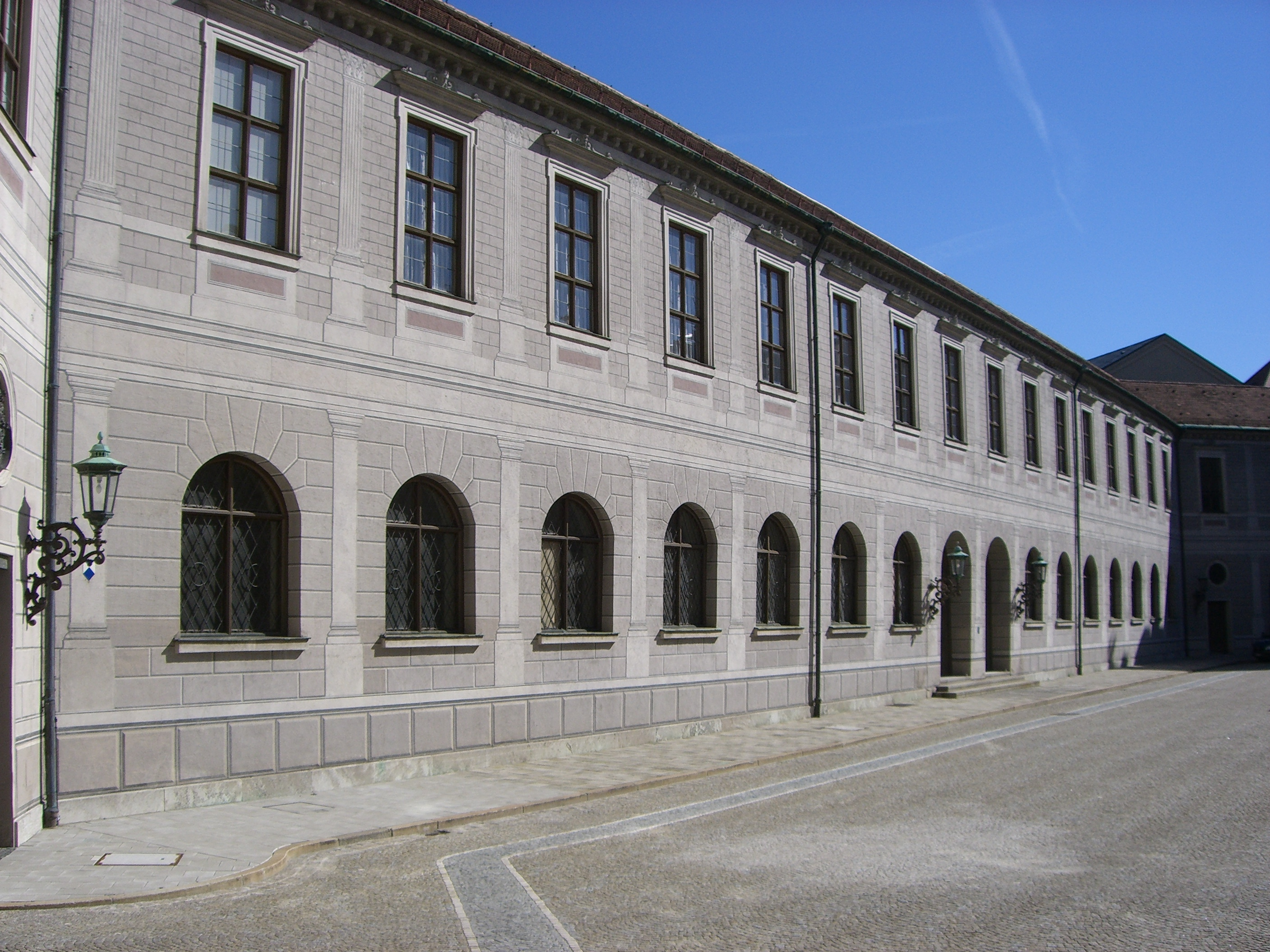 Altes Residenztheater